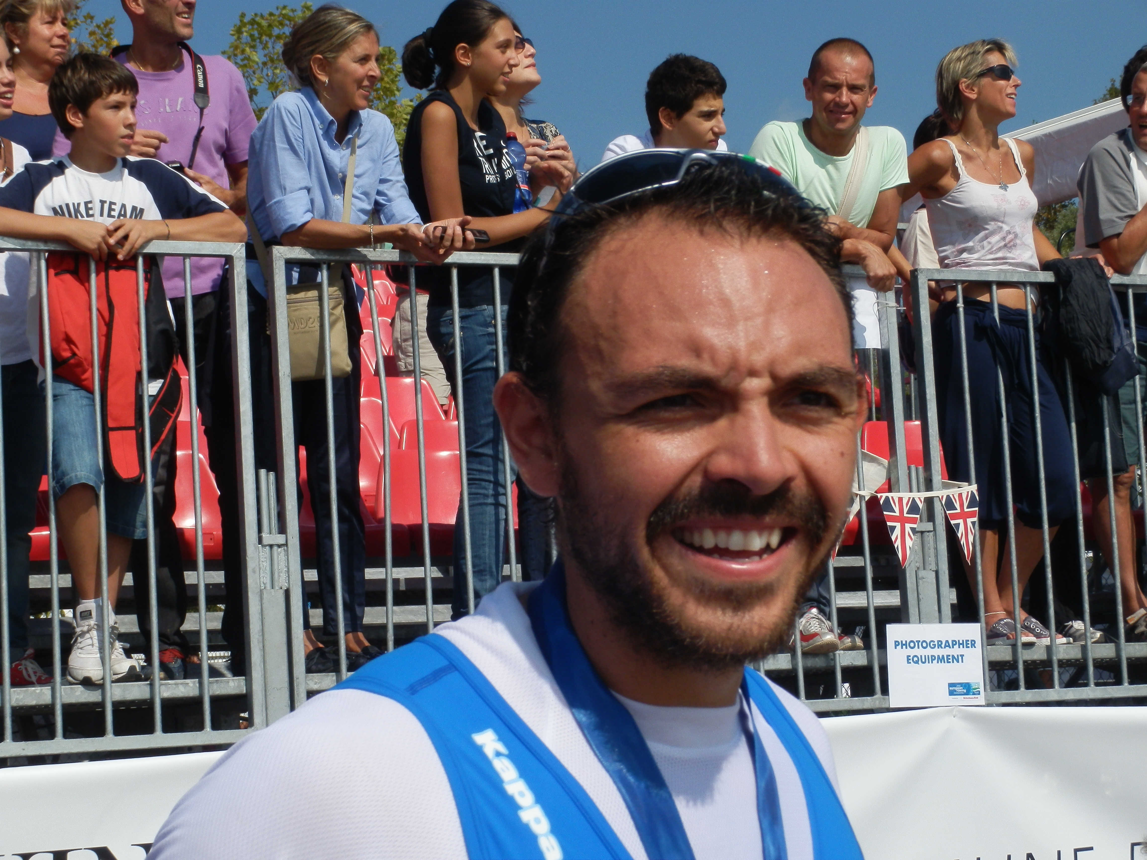 Frattini dopo la premiazione con la medaglia d'argento agli Europei 2012